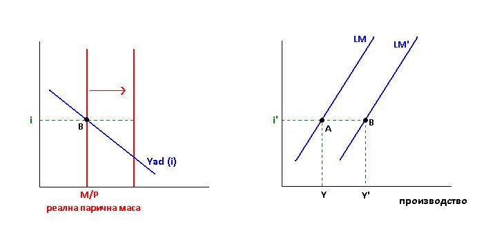 Зголемувањето на понудата на пари при дадено ниво на каматни стапки создава ситуација на вишок на понуда на пари. Тоа значи дека сите точки на оригиналната LM крива сега претставуваат комбинација на (i, Y) при вишок на понуда на пари. За да се воспостави повторно рамнотежа, побарувачката на пари мора да биде повисока. За да се постигне ова, или каматната стапка мора да биде пониска или доходот мора да биде повисок. Според тоа, новата LM крива лежи под и надесно од старата.